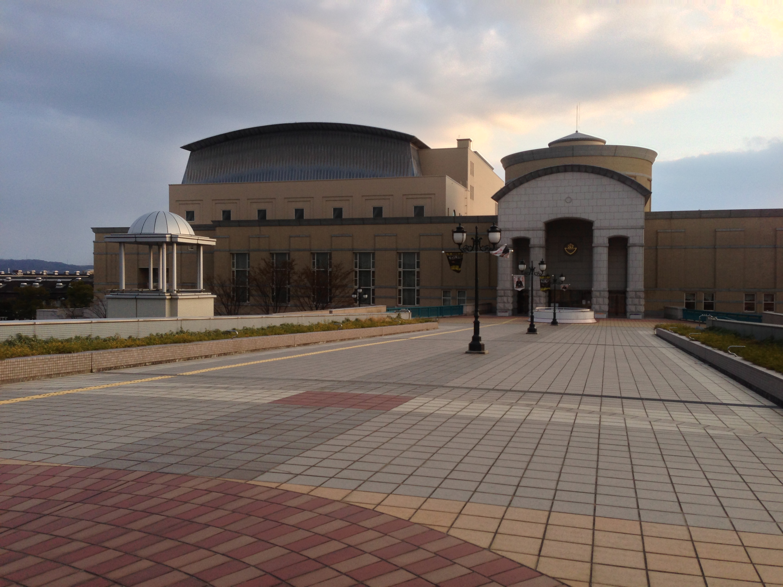 福山市の芸術文化劇場 リーデンローズ